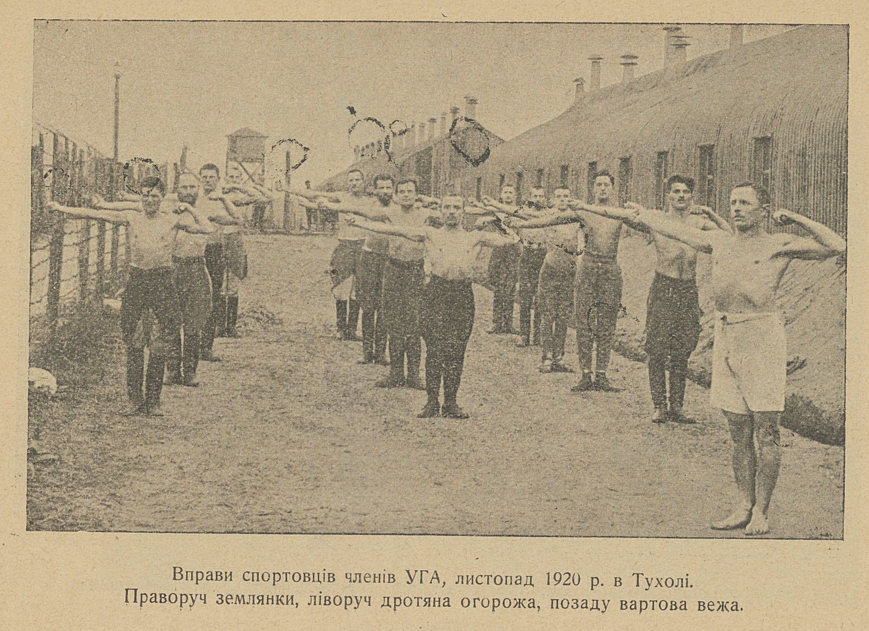 Полоненні вояки УГА в Тухолі. 1920 рік.